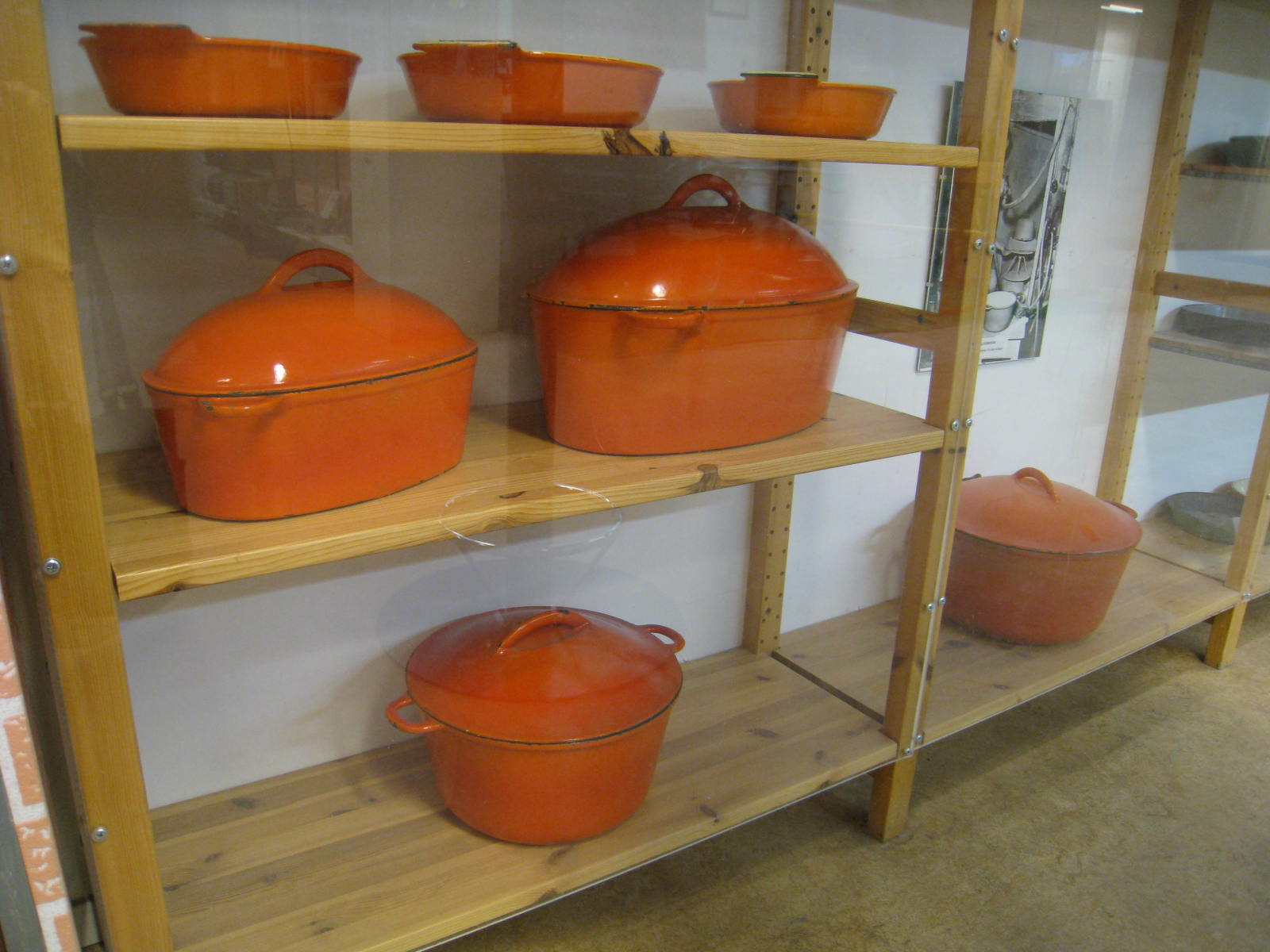 Bolindermuseet, Folkets hus, Kallhäll, emaljerade grytor från Bolinders Mekaniska Verkstad.